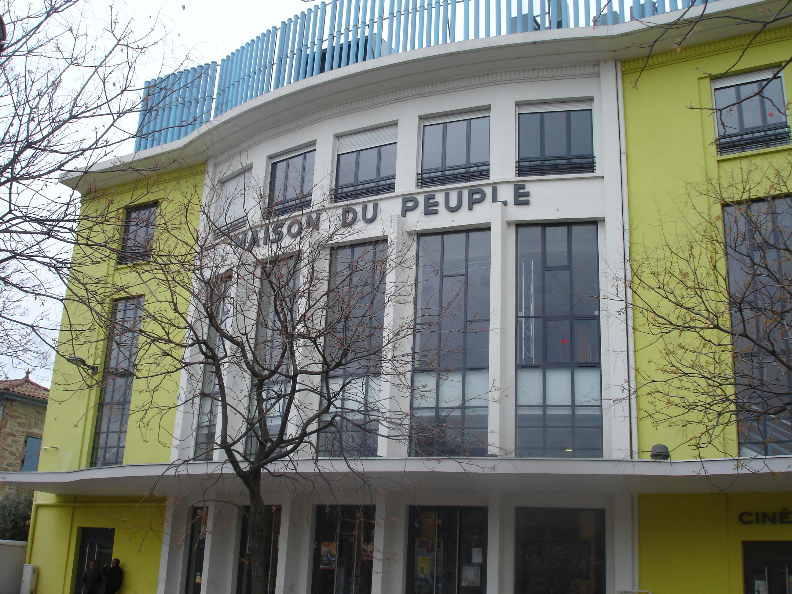 Pierre-Bénite (69) : La maison du peuple